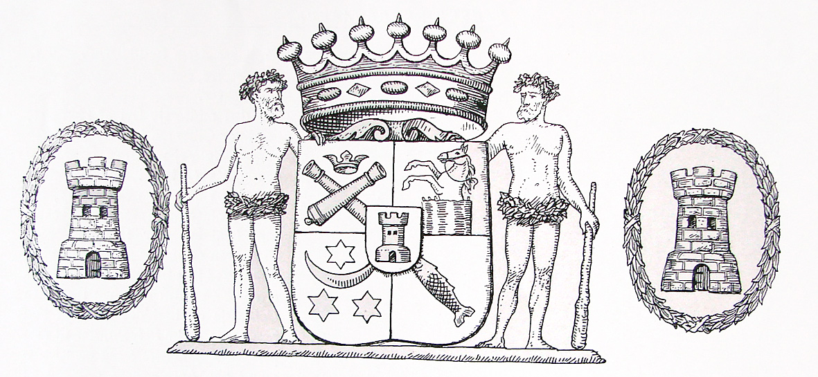 Adelsvåben for Baron Gyldencrone fra Vilhelmsborg, Århus Denmark